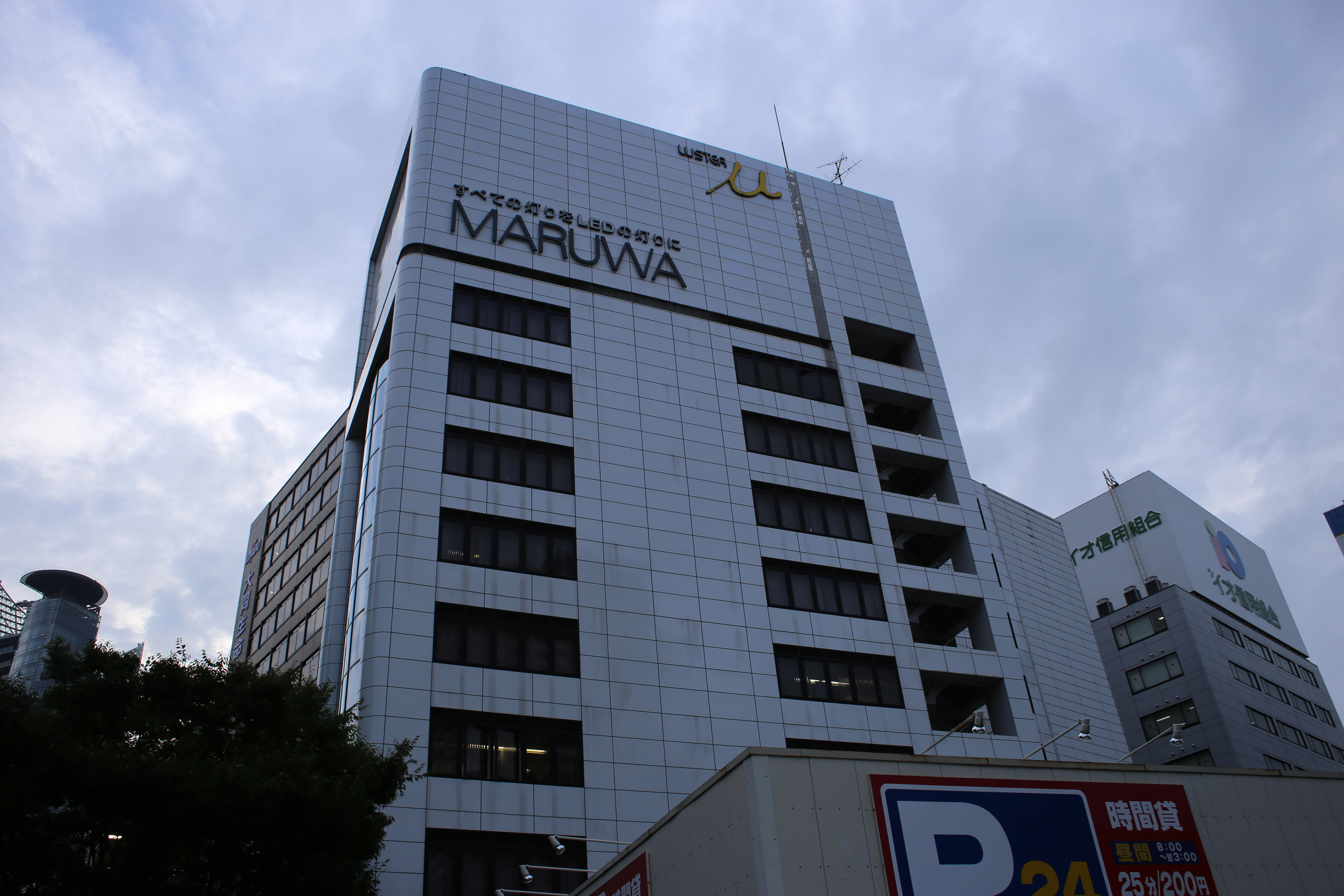 名古屋市中村区名駅四丁目のMARUWA名駅ビルを東側公道南側より撮影